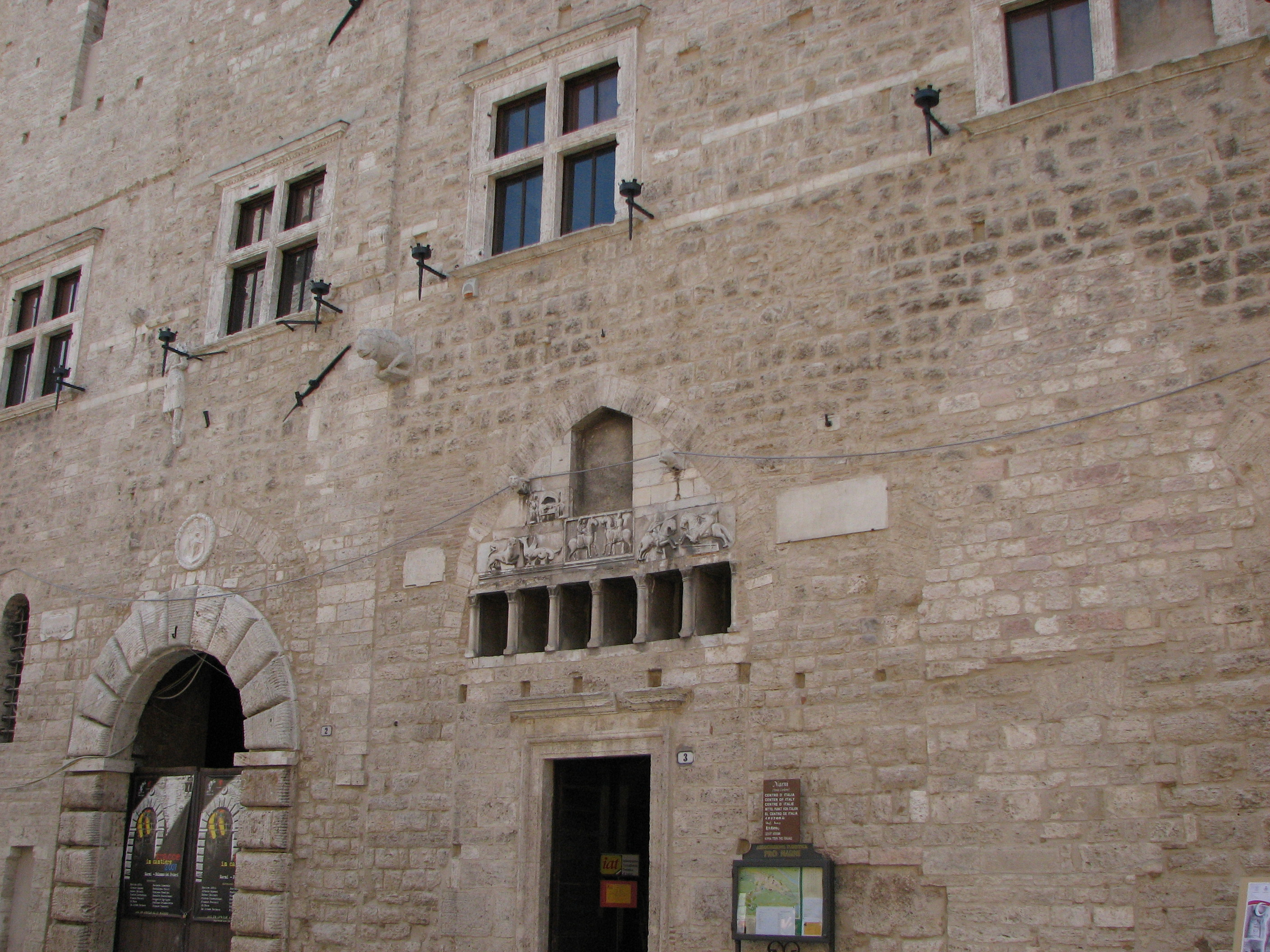 Narni Palazzo Comununale